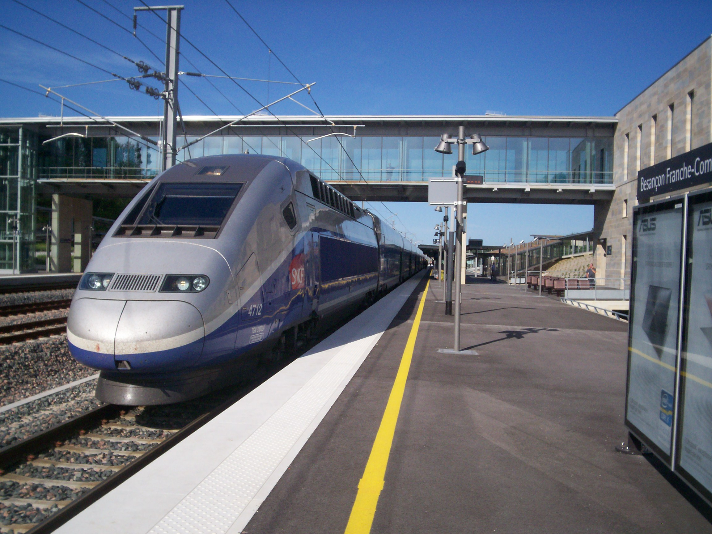 Un TGV Duplex 2N2 à destination de Marseille-Saint-Charles en gare de Besançon-Franche-Comté-TGV.